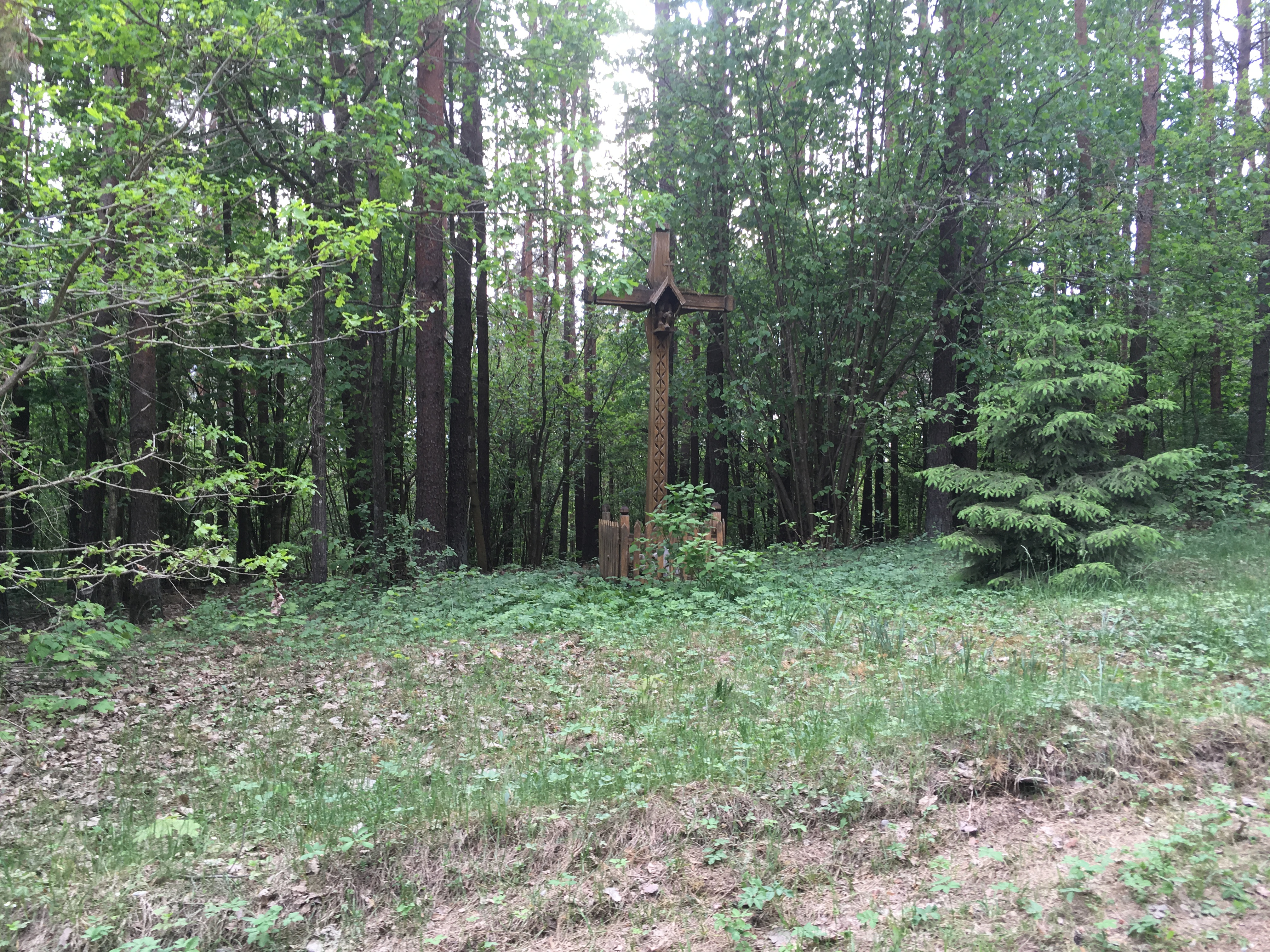 Kryzius Smukuciu senkapyje